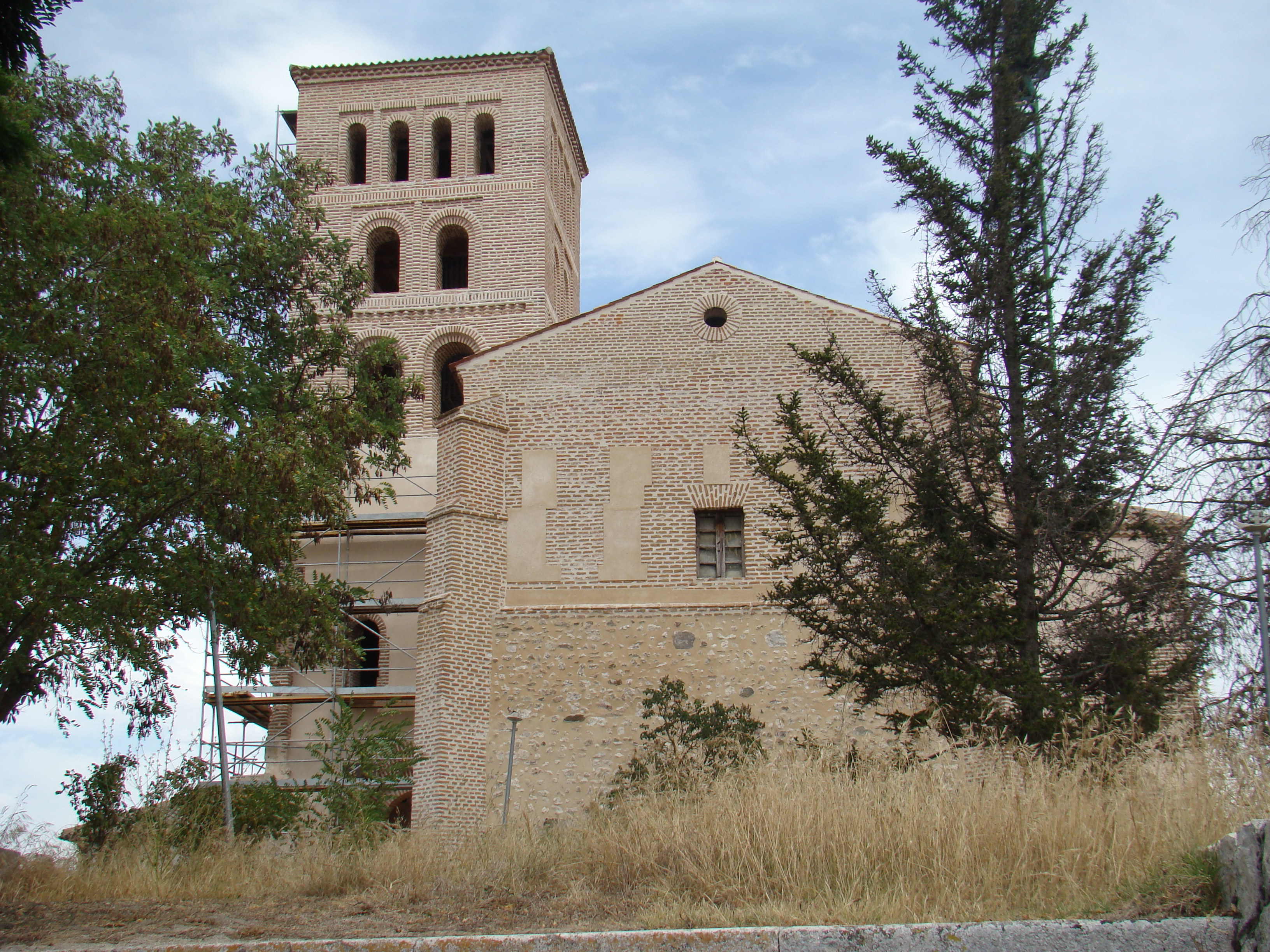 Torre mudéjar de la iglesia de Samboal en el municipio de Samboal, Segovia (España).